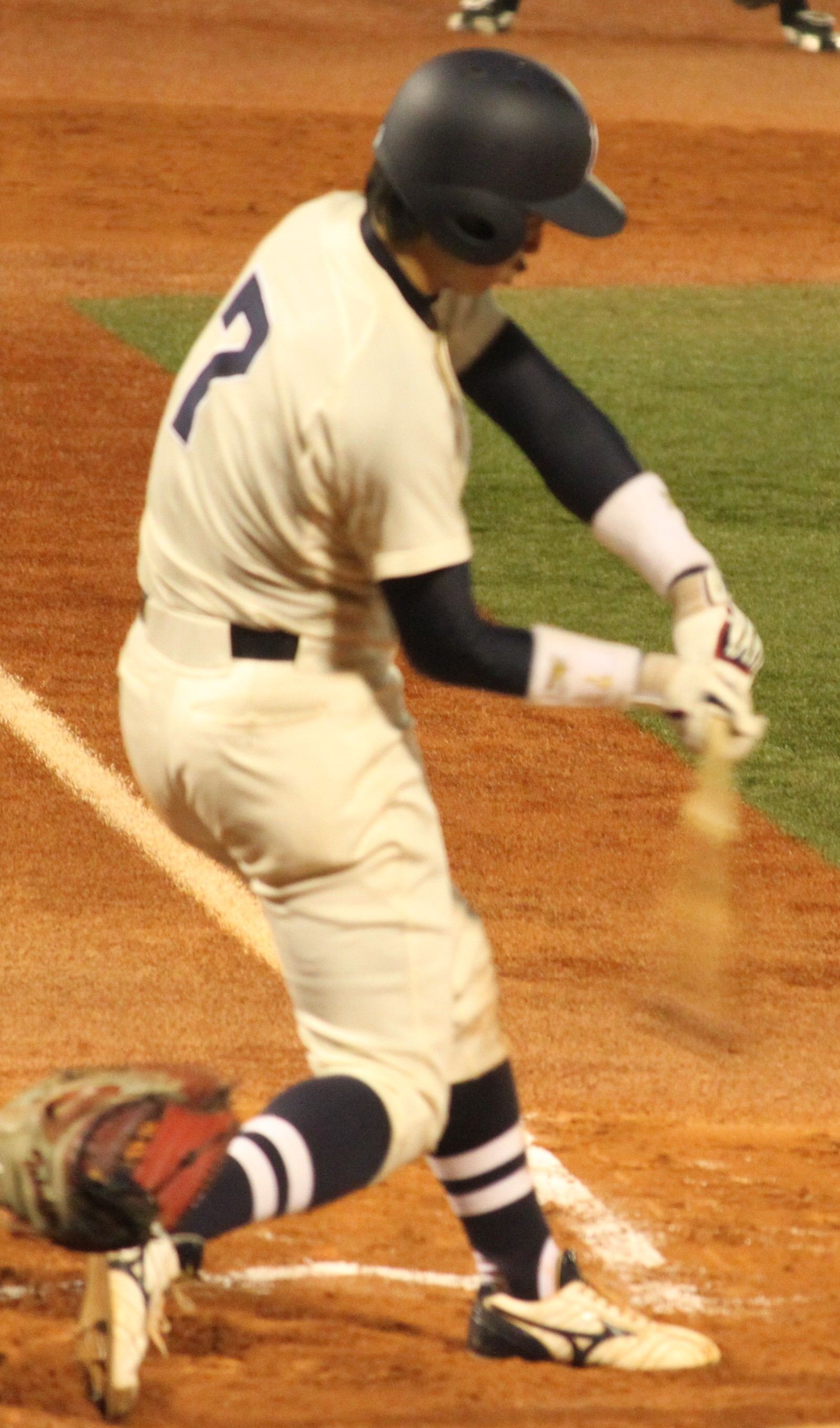 國學院大學硬式野球部内野手の谷内 亮太。明治神宮野球場にて。